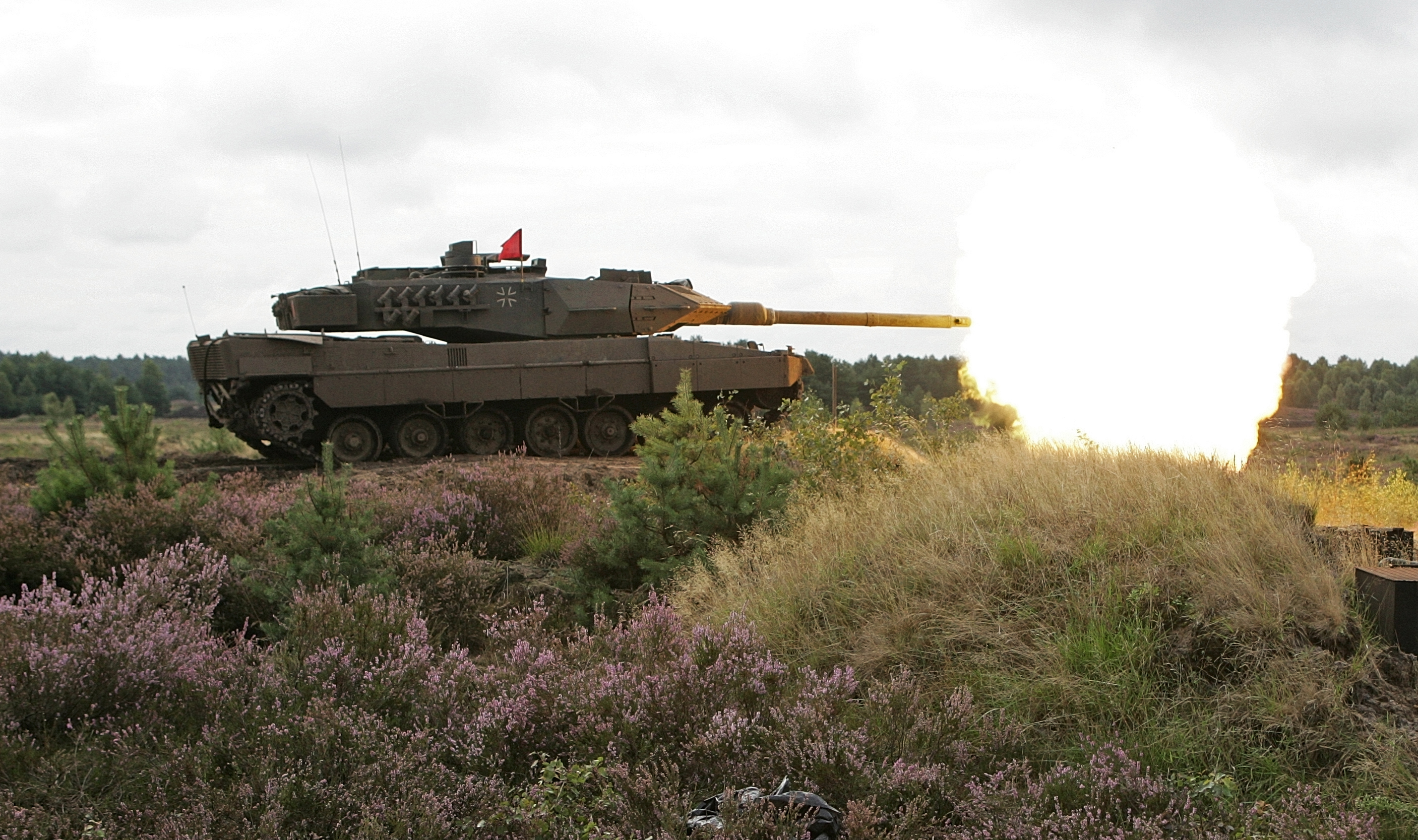 Scharfer Schuss eines Leopard 2A6 auf der Schiessbahn. Vorüben der Informationslehrübung Heer. Die Panzerlehrbrigade 9 stellt vom 4. bis 10. September die Fähigkeiten des deutschen Heeres auf dem Truppenübungsplätzen Munster und Bergen vor. Unterstützt wird die Lehrbrigade dabei vom Ausbildungszentrum Munster. In diesem Jahr wird das heutige und zukünftige Aufgabenspektrum des deutschen Heeres in dieser Lehrübung dargestellt. Die Informationslehrübung richtet sich in erster Linie an den Führernachwuchs der Bundeswehr, der Offizierschule des Heeres und Soldaten ausländischer Streitkräfte. ©Bundeswehr/Mandt